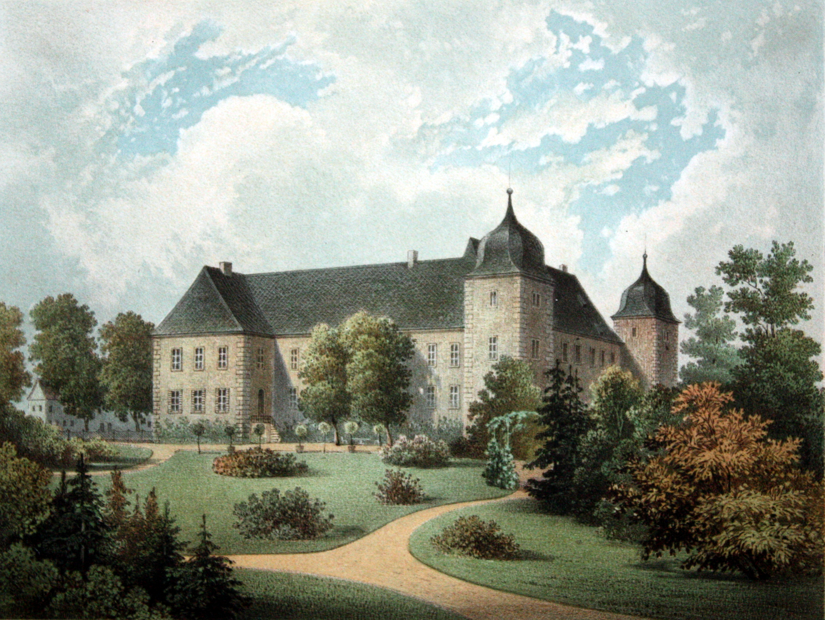 Das ehemalige Schloss in Straußfurt, Kreis Weißensee